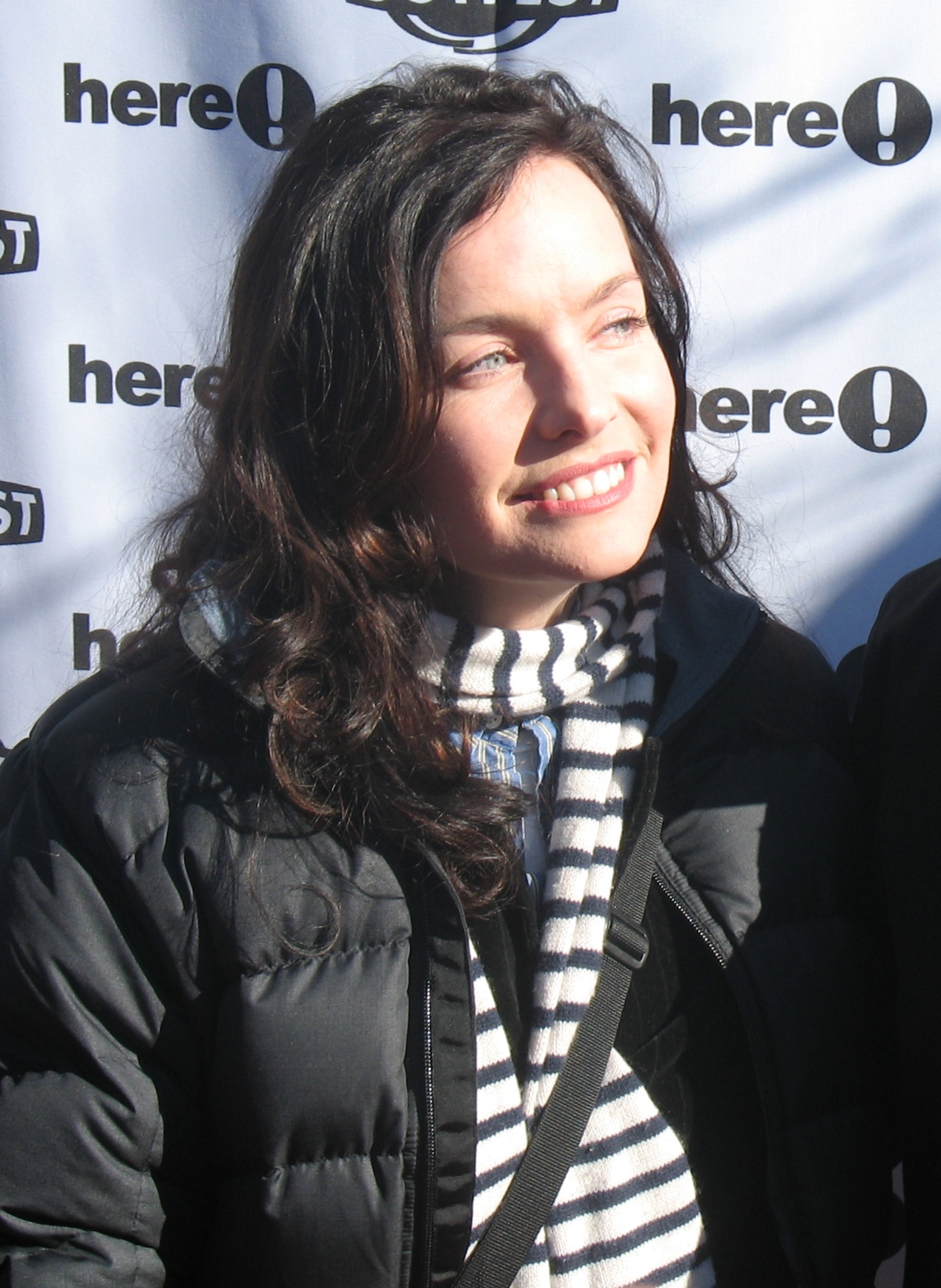 Guinevere Turner